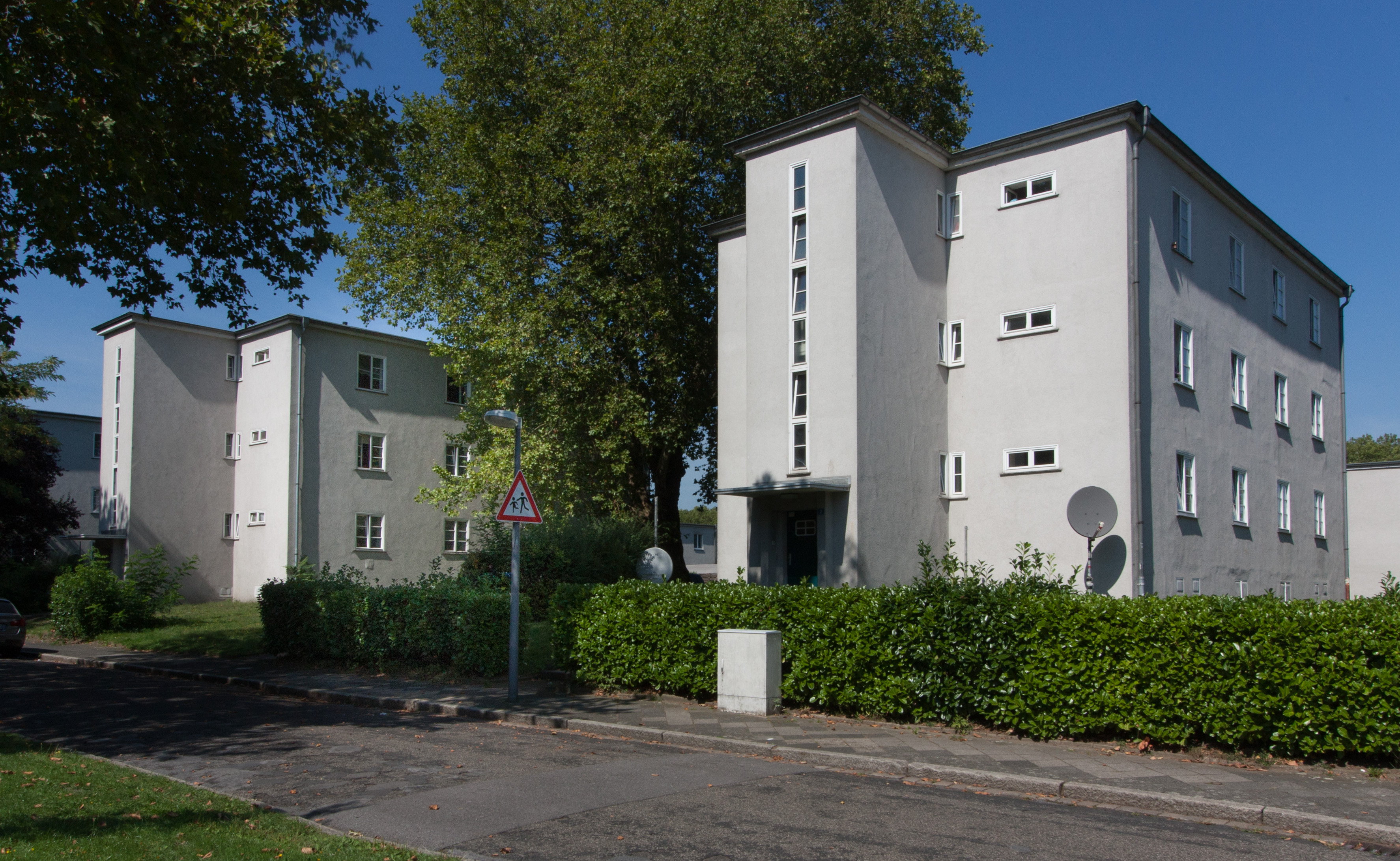 Gelsenkirchen-Buer Monument 218 Siedlung SpinnstuhlThis is a photograph of an architectural monument., no. 218